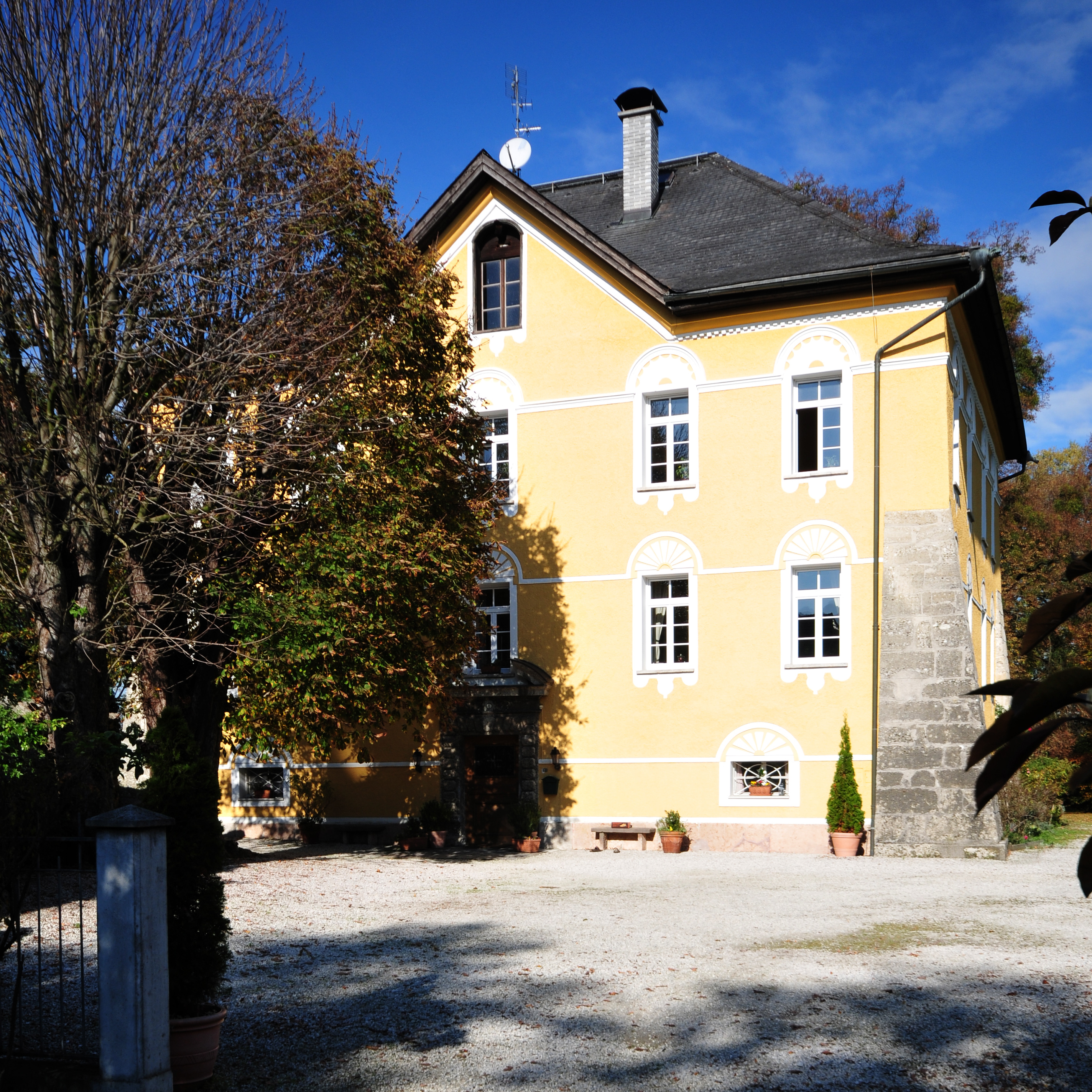 Schloss Lasseregg in Niederalm bei Anif, Salzburg Wikipedia im Landtag – Salzburg 31. Oktober 2012 in SalzburgDieses Foto wurde im Rahmen des Projektes „Wikipedia im Landtag“ erstellt.